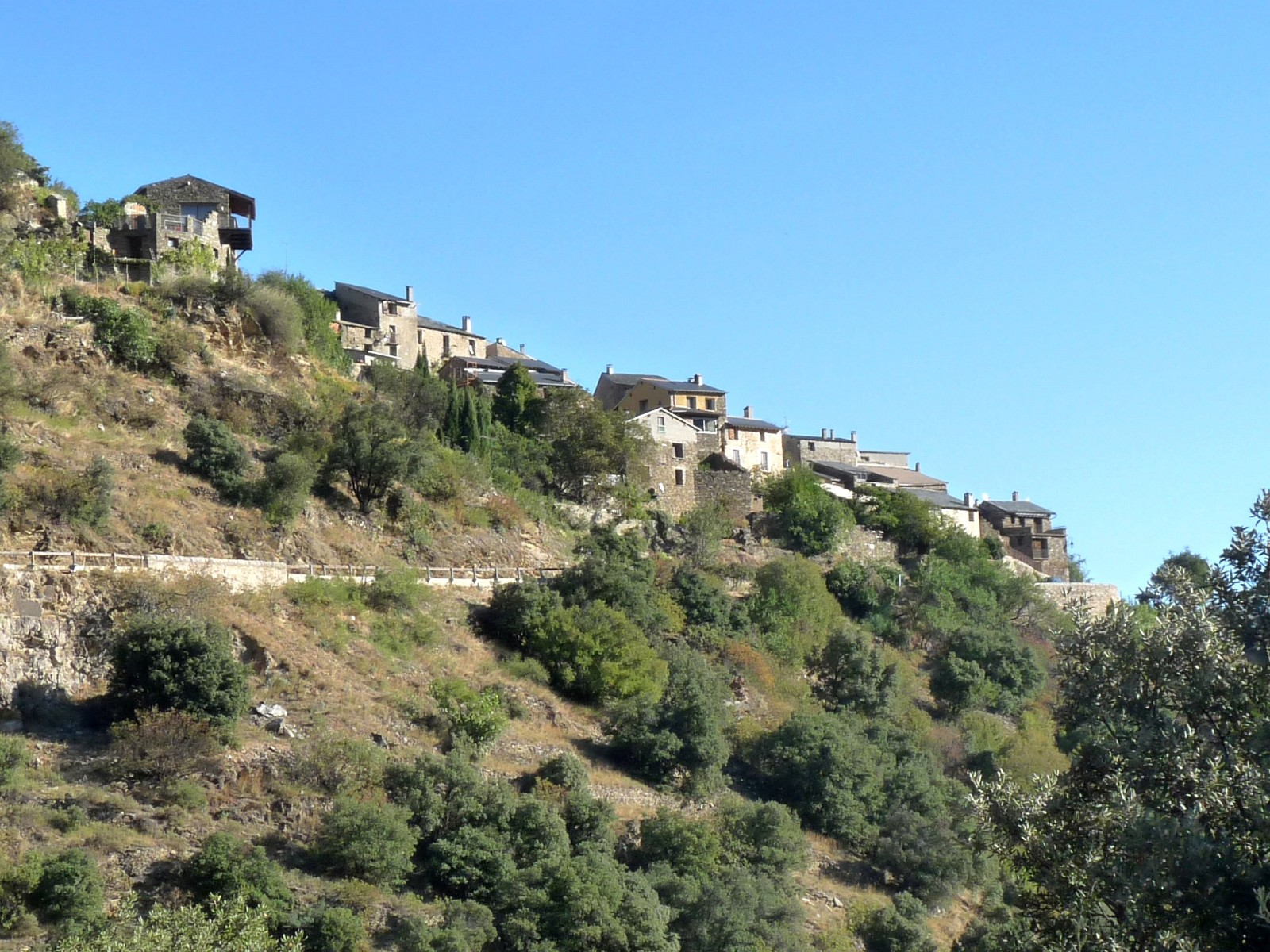 Arrivée sur Canaveilles , Pyrénées-Orientales, France